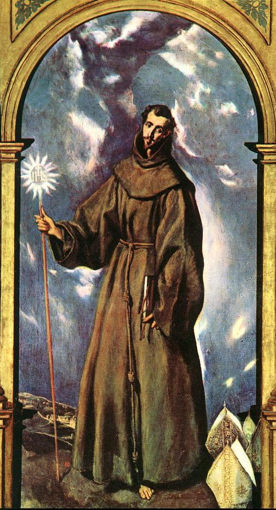 La obra representa a San Bernardino de Siena (1380-1444), fraile franciscano y también misionero.